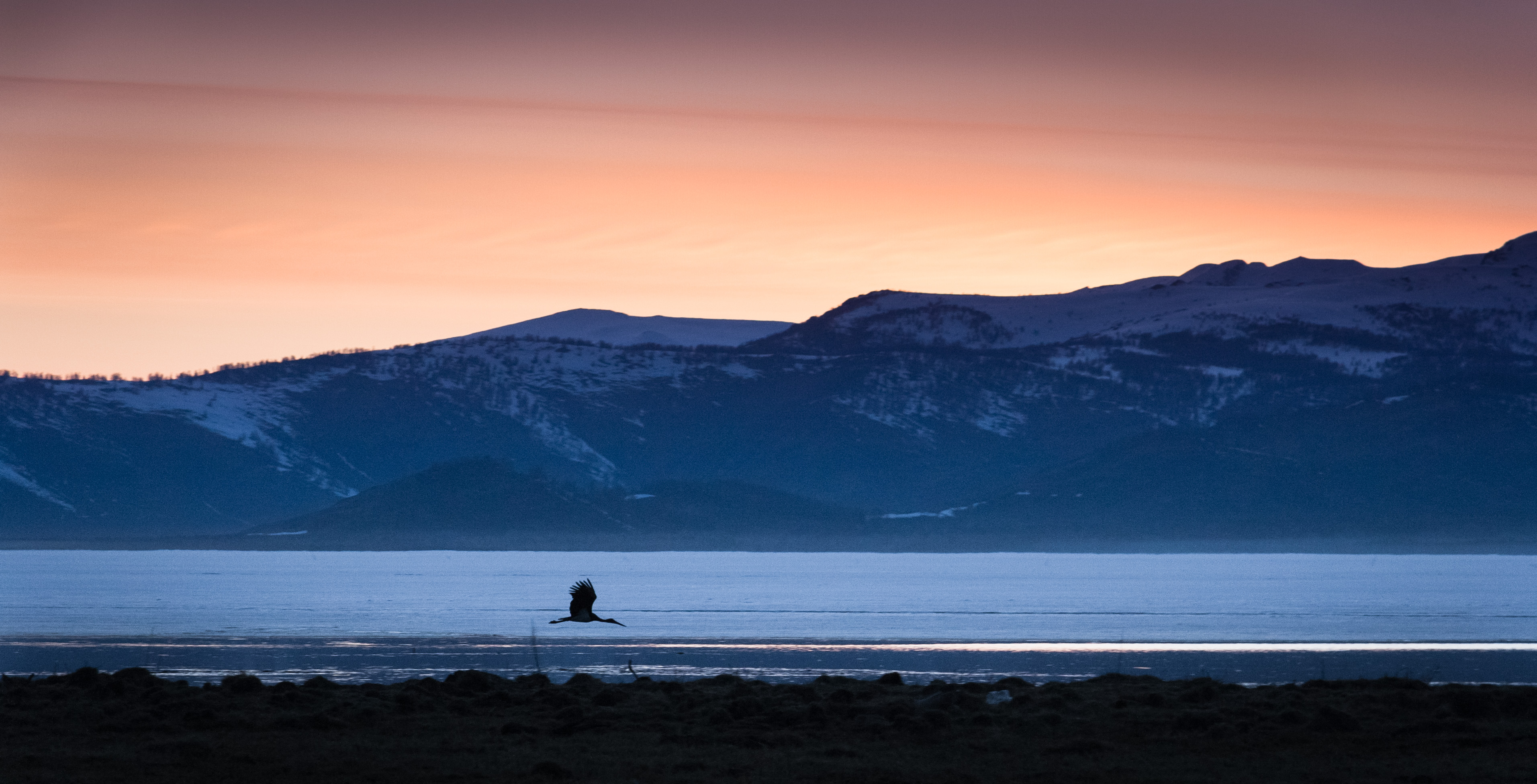 Markakol lake